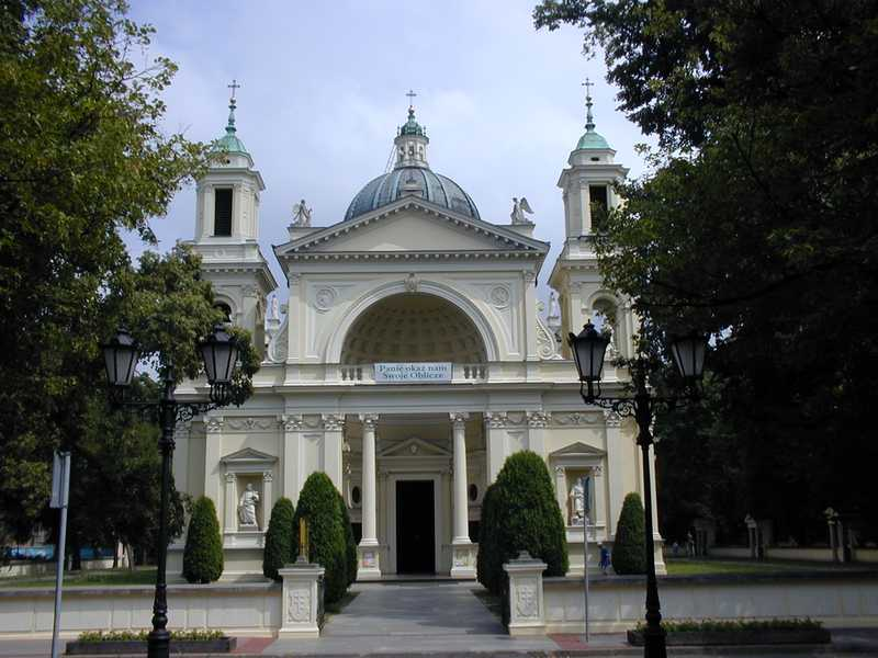 St Anne Church in Warsaw